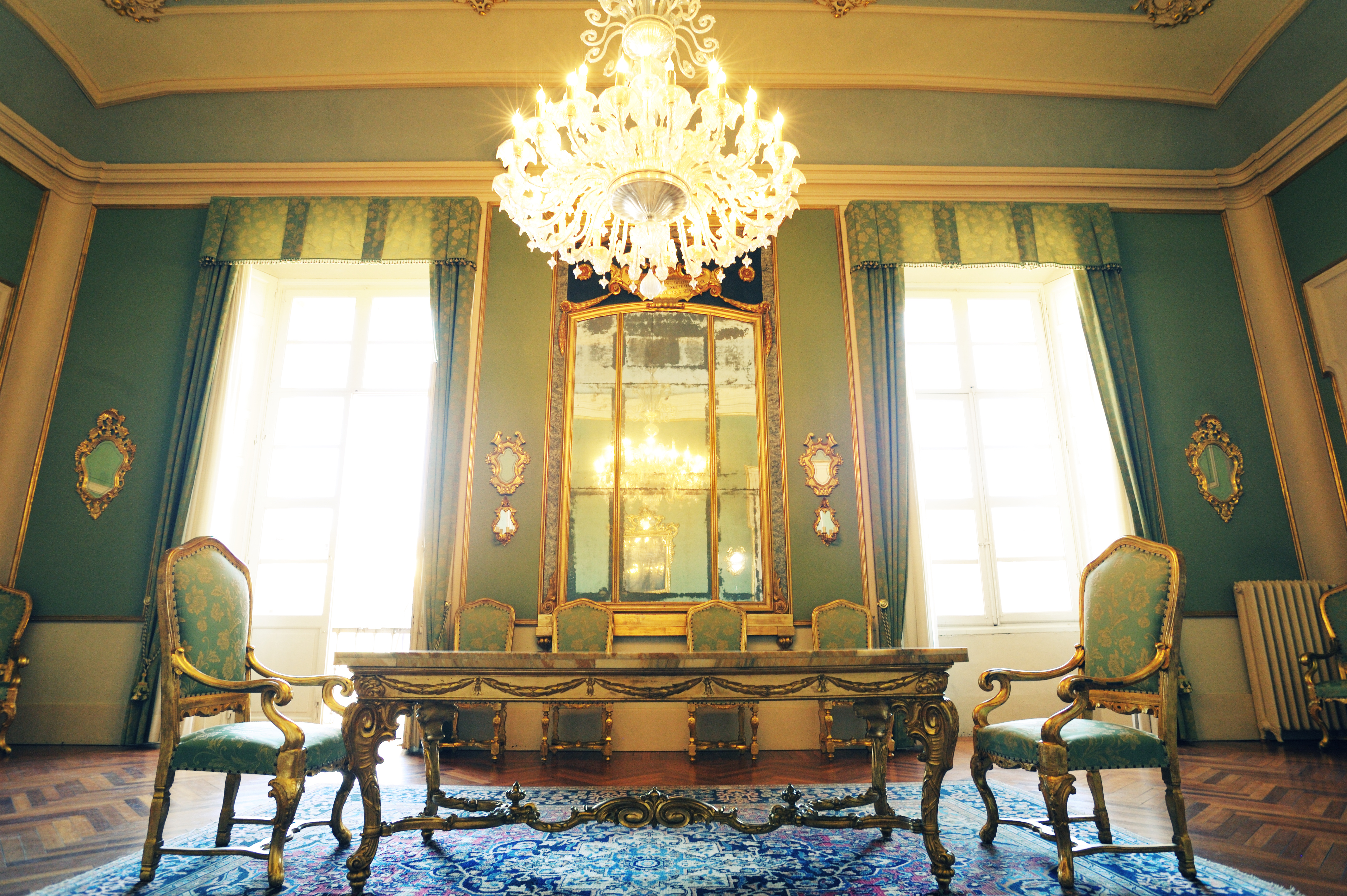 Palazzo comunale This is a photo of a monument which is part of cultural heritage of Italy.